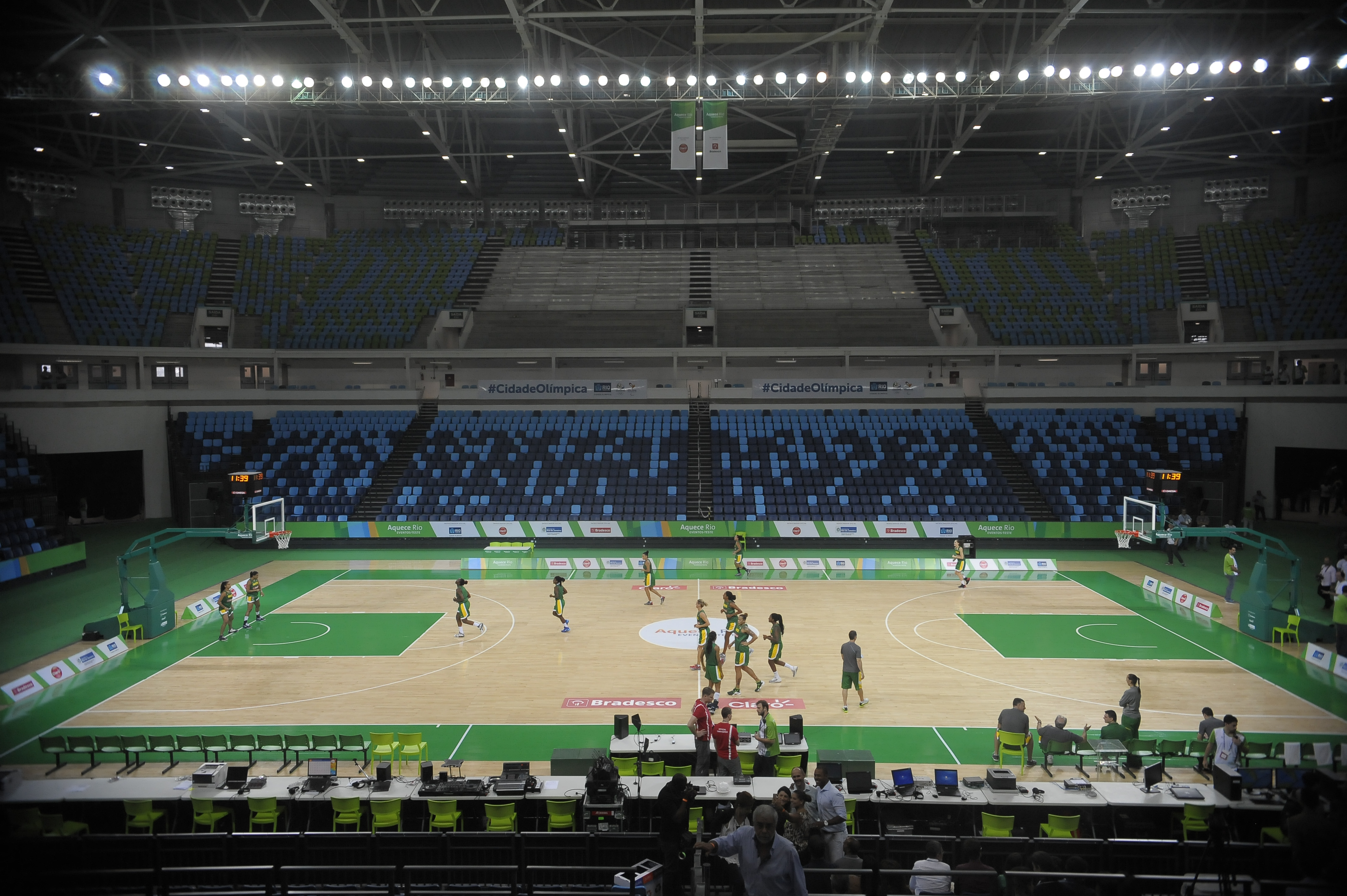 Inaugurazione dell'Arena Carioca 1